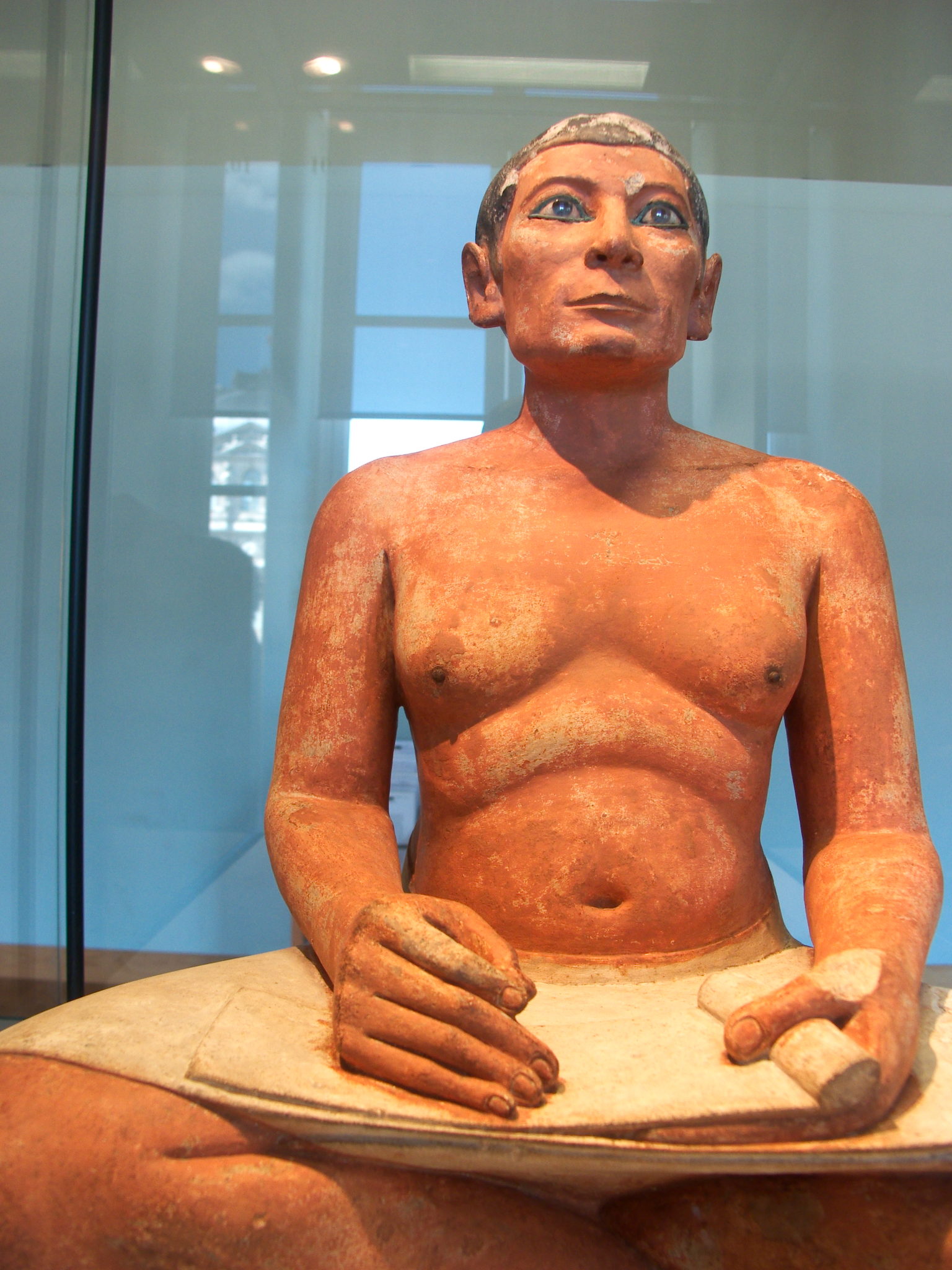 Scribe accroupi. Musée du Louvre.